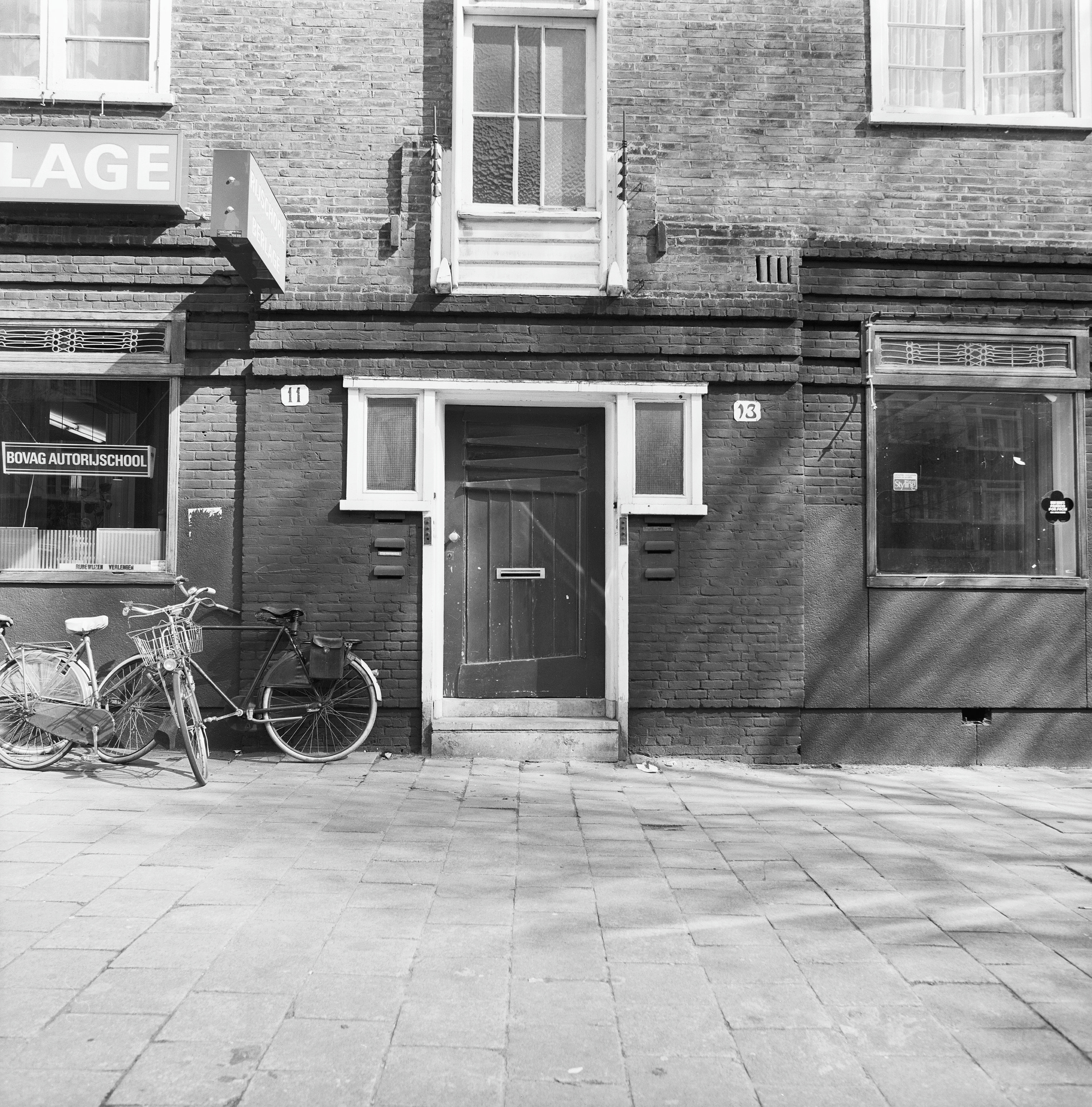 ingangspartij